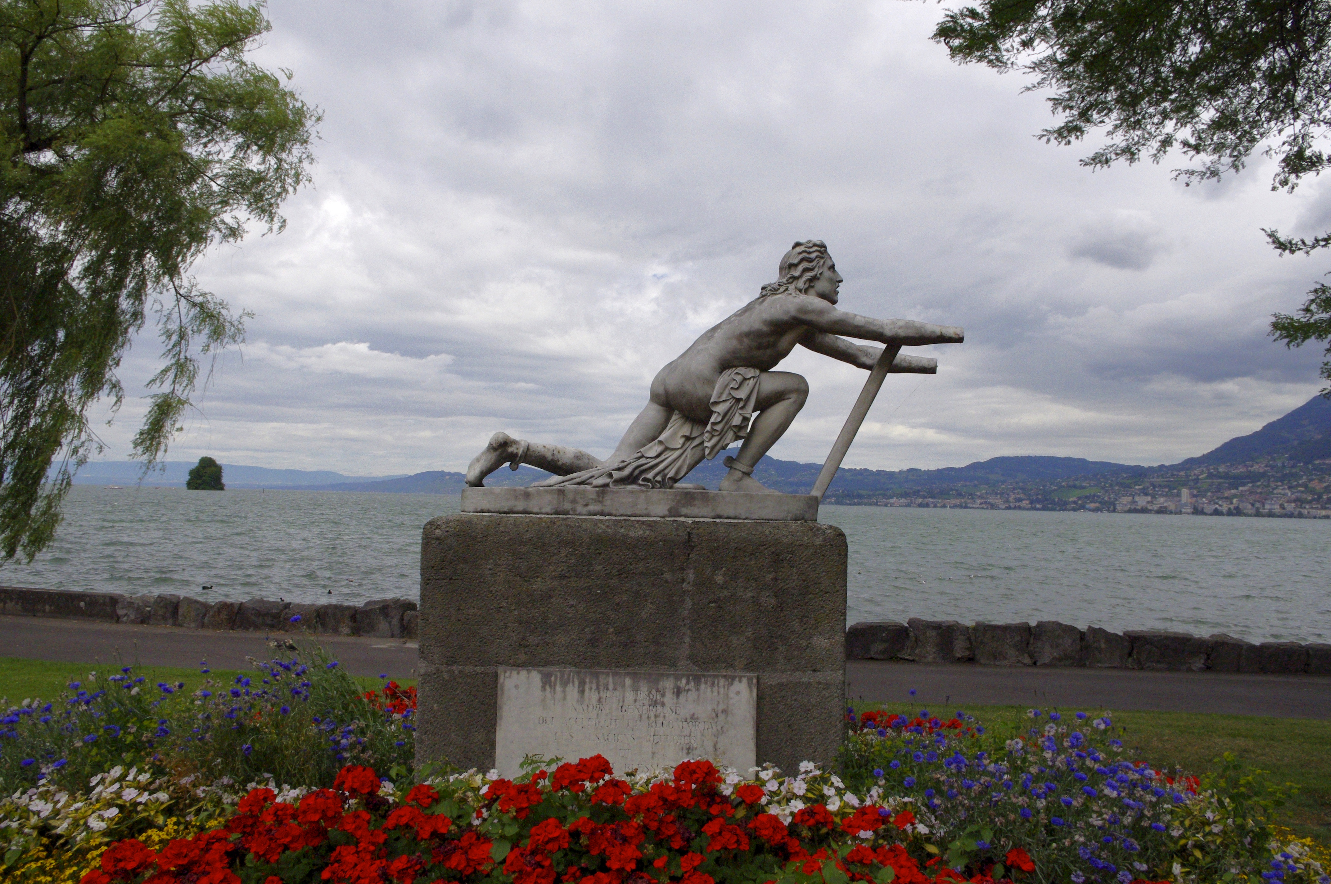 Villeneuve, Vaud, Suisse - sculpture de Philippe Grass sur le lac Léman. Inscription sur le socle : A la Suisse Nation généreuse qui accueillit et reconforta les Alsaciens refugiés ... blessé ...